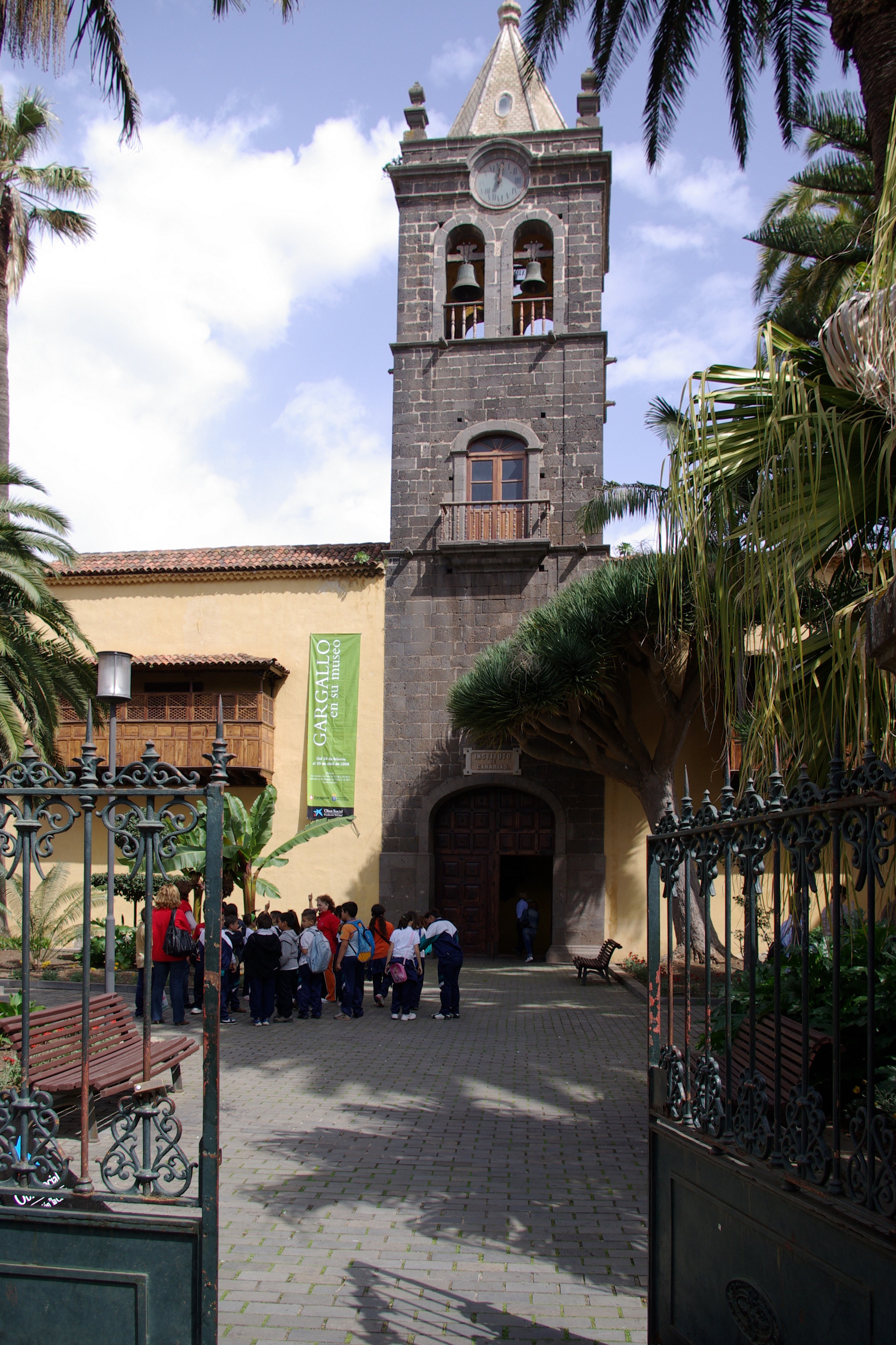 Teneriffa, La Laguna, Instituto de Canarias Cabrera Pinto